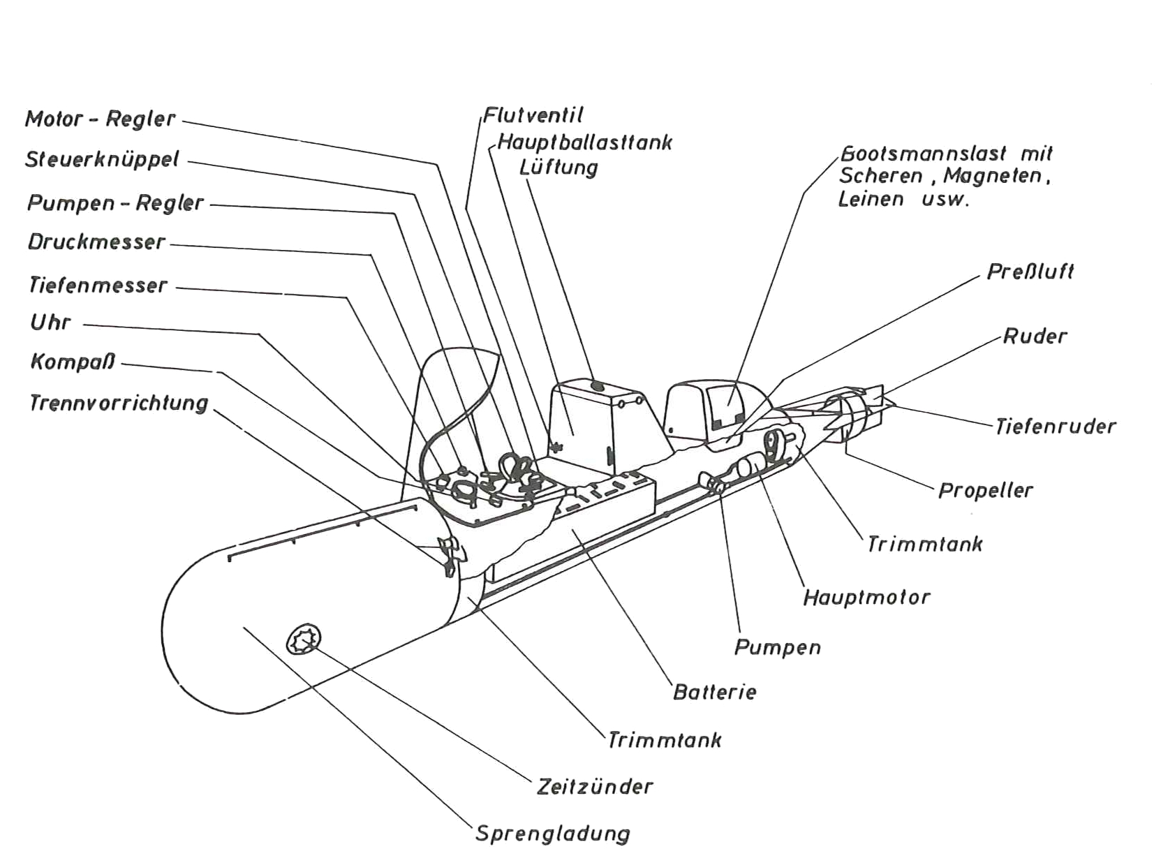 Bemannter britischer Torpedo des Typs Chariot